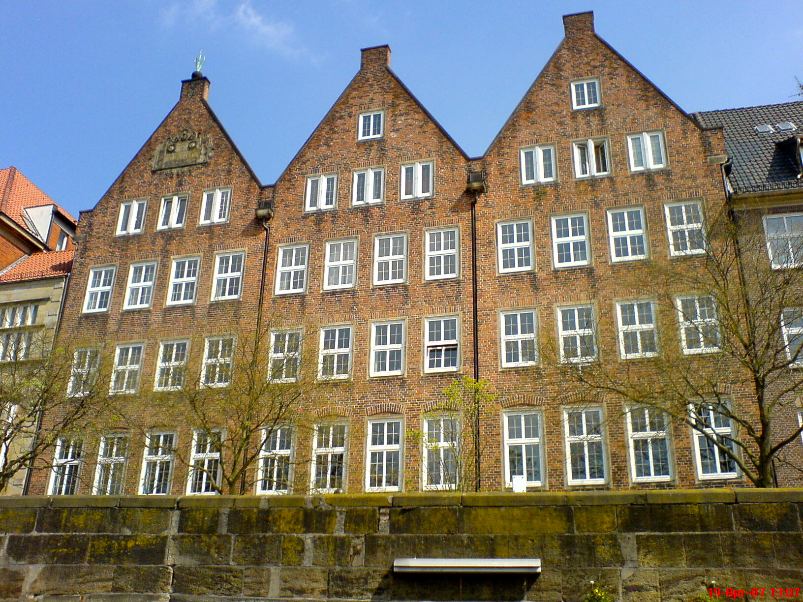 Gollücke und Rothfos in Bremen, Schlachte 3, 4, 5 / Ulenstein 1.Das abgebildete Objekt ist ein geschütztes Kulturdenkmal in der Freien Hansestadt Bremen, mit der Nr. 1102 beim Landesamt für Denkmalpflege registriert.